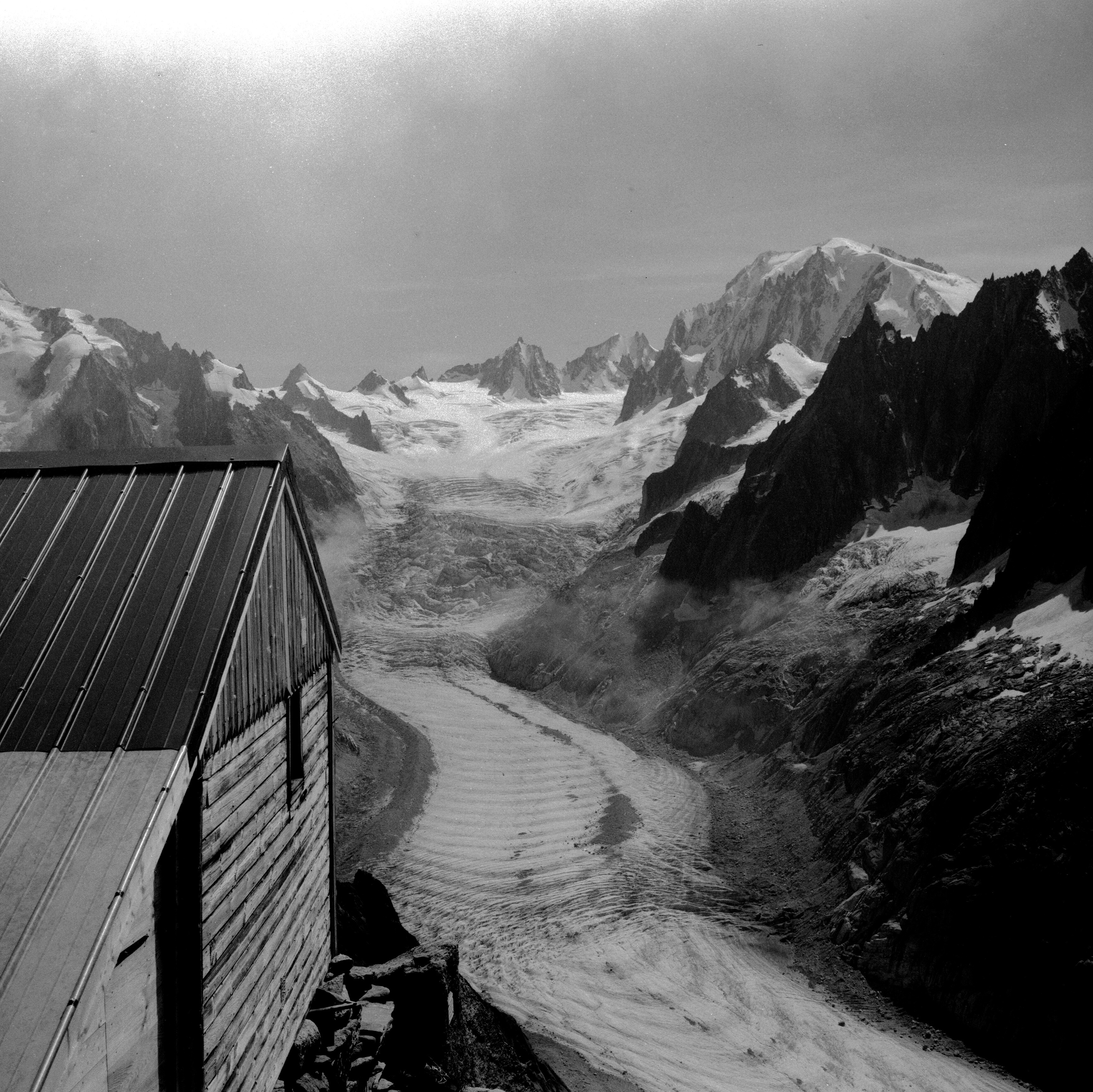 Vue depuis le refuge de la Charpoua